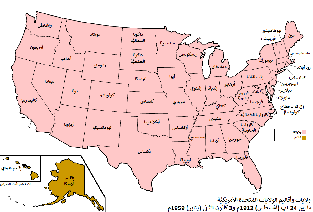 خريطة ولايات وأقاليم الولايات المُتحدة الأمريكيَّة كما كانت ما بين شهريّ آب (أغسطس) 1912 وكانون الثاني (يناير) 1959. بِتاريخ 24 آب (أغسطس) 1912، جُعلت مُقاطعة ألاسكا إقليمًا باسم إقليم ألاسكا. وبِتاريخ 3 كانون الثاني (يناير) 1959، أصبح إقليم ألاسكا ولايةً جديدةً ضمن الاتحاد الفدرالي الأمريكي.